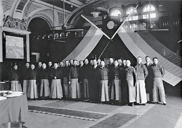 亚细亚照相馆摄/中国第二历史档案馆藏。南北议和代表，上海，1919年2月20日。自左至右：钟文耀、（佚名）、曾彦、郭椿森、彭允彝、胡汉民、李国珍、刘恩格、缪嘉寿、方枢、朱启钤、吴鼎昌、唐绍仪、李述膺、章士钊、饶鸣銮、施愚、王伯群、徐佛苏、刘光烈、王克敏、汪有龄、江绍杰、周诒春、贾士毅。